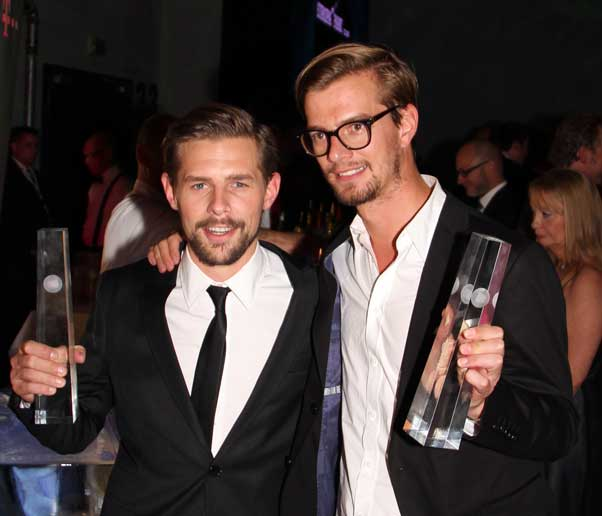 Preisträger |Klaas Heufer-Umlauf| und Joko Winterscheidt beim Deutschen Fernsehpreis 2012